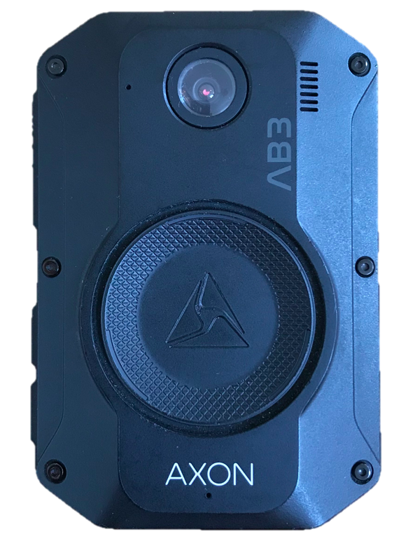 Een bodycam van Axon